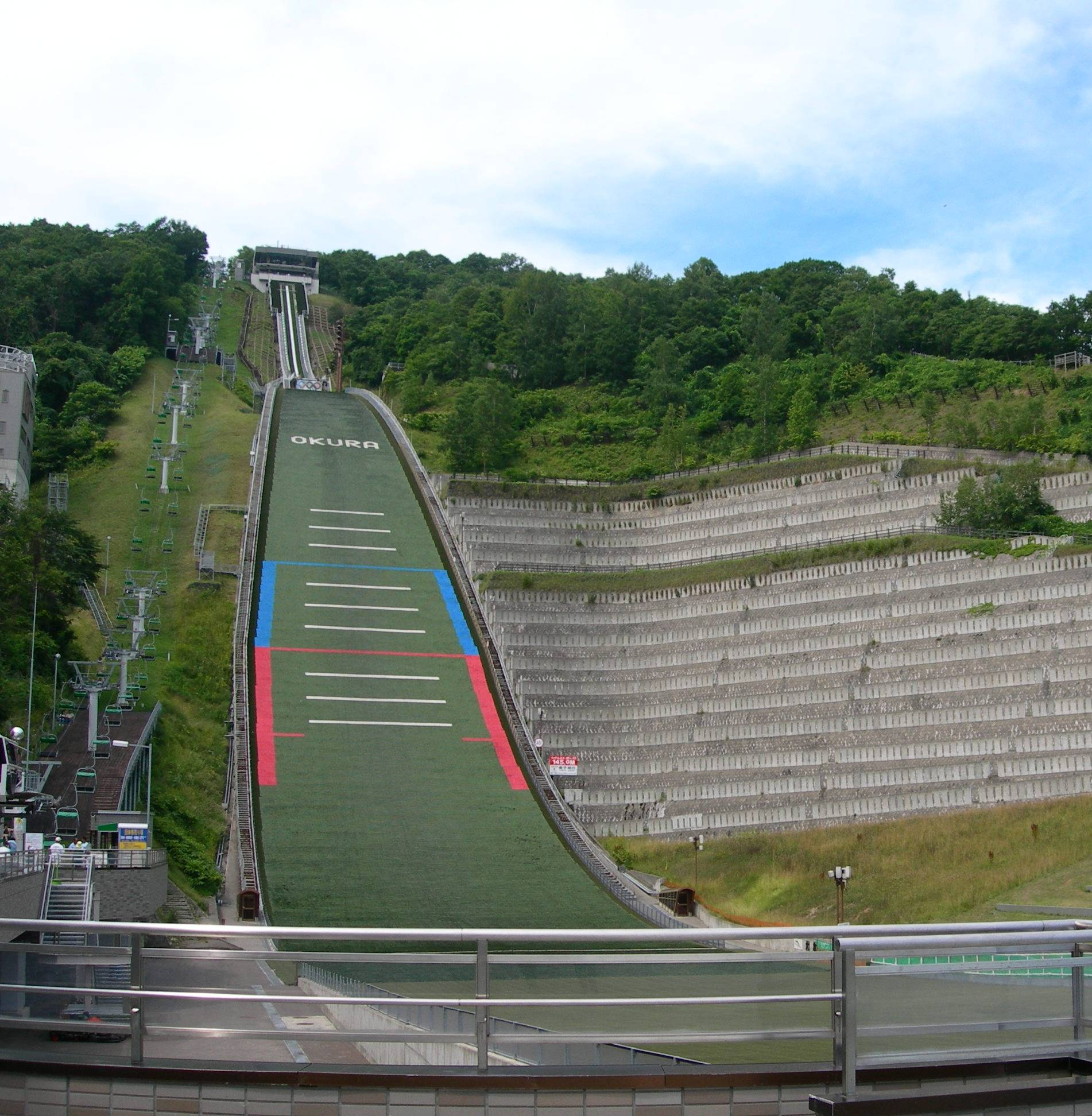 Die Sprungschanze in Sapporo (Japan). Hier fanden 1972 die Olympischen Winterspiele statt.